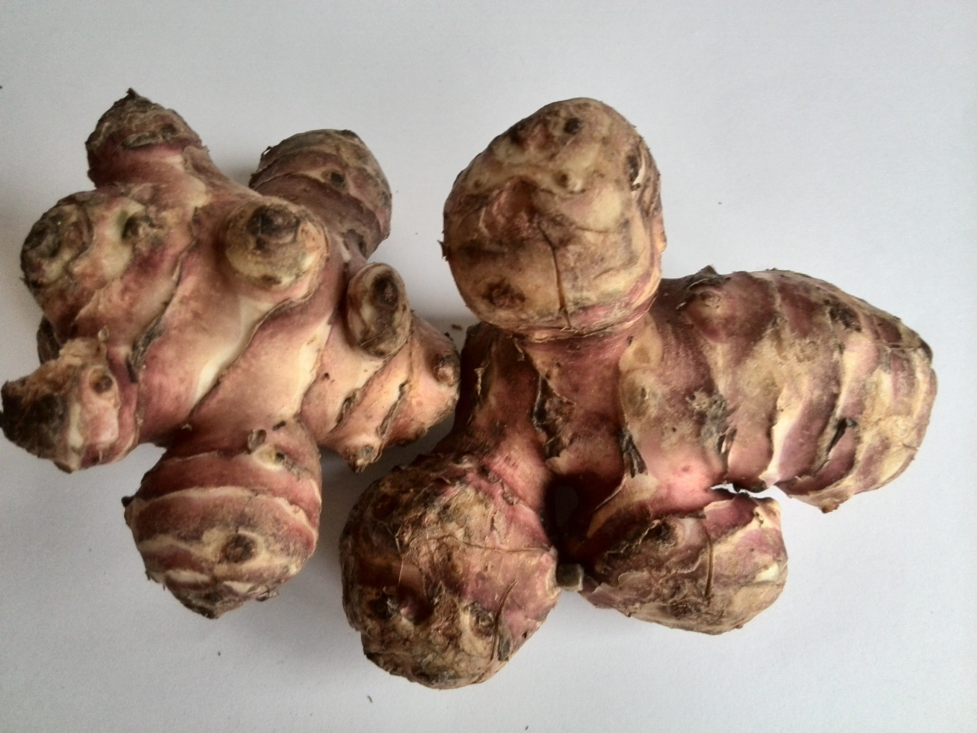 Topinambur gomolj.